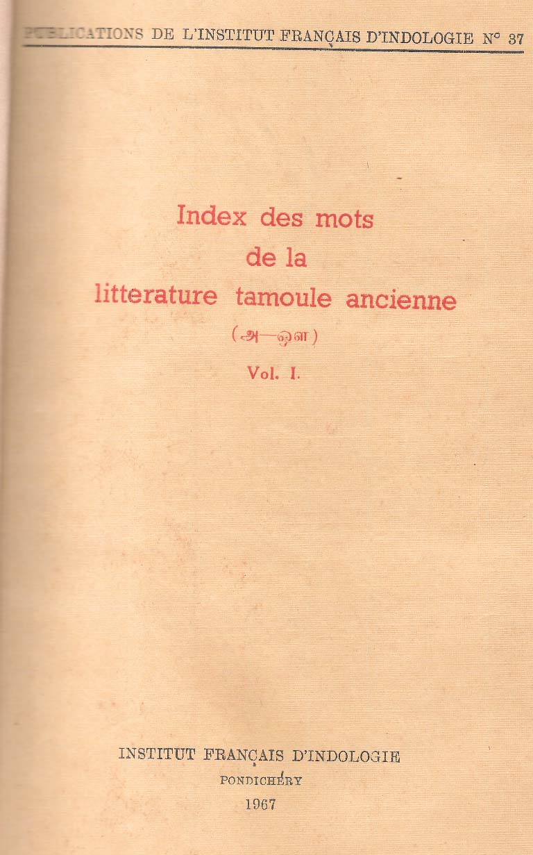 Index des mots de la literature tamoule ancienne (அ – ஔ) Vol. 1 first page. சங்கநூல் சொல்லடைவு மூன்று தொகுதி நூல்களில் முதல் தொகுதியின் முதல் பக்கம்.